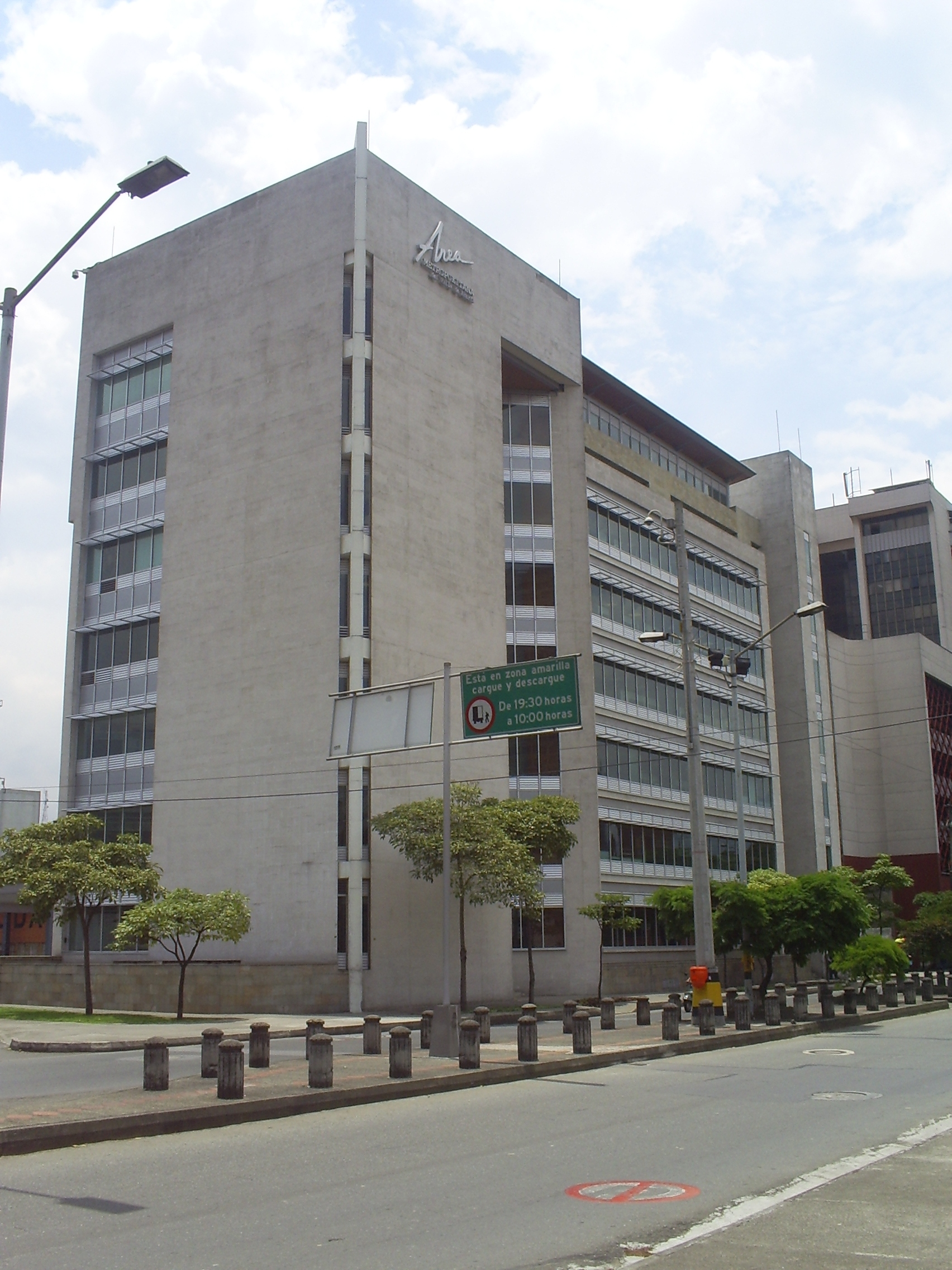 edificio sede del Área Metropolitana, Medellín, Colombia.